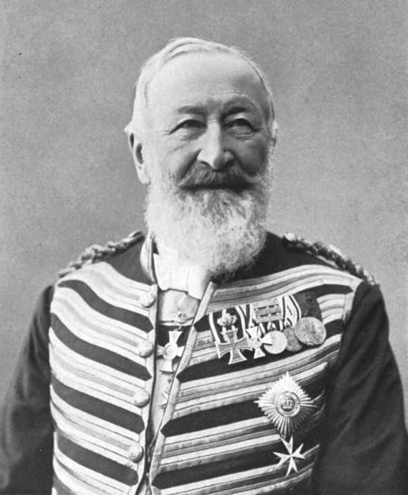 'Graf von Borcke-Stargordt, Königl. Schloßhauptmann von Stettin, Vorsitzender des Gründungs-Komitees des Kamerun-Eisenbahn-Syndikats.'